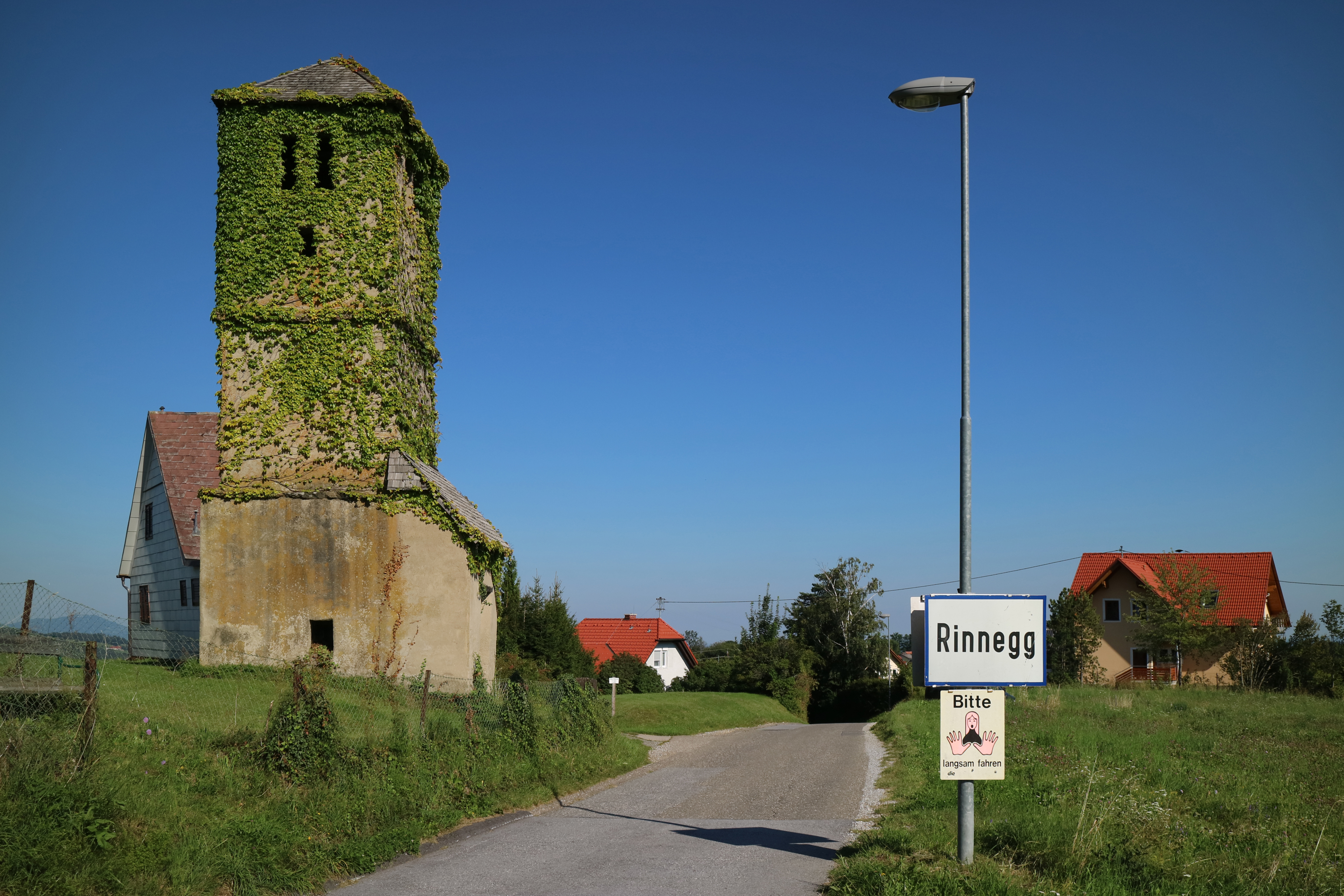 Wetterturm an der nordwestlichen Ortseinfahrt von Rinnegg bei Graz